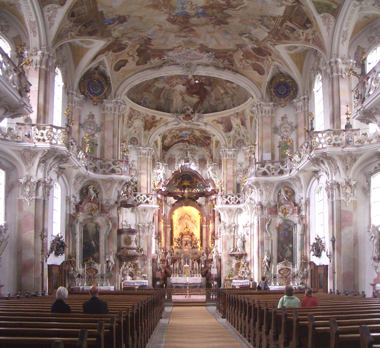 Wallfahrtskirche Birnau, Germany: Interior view